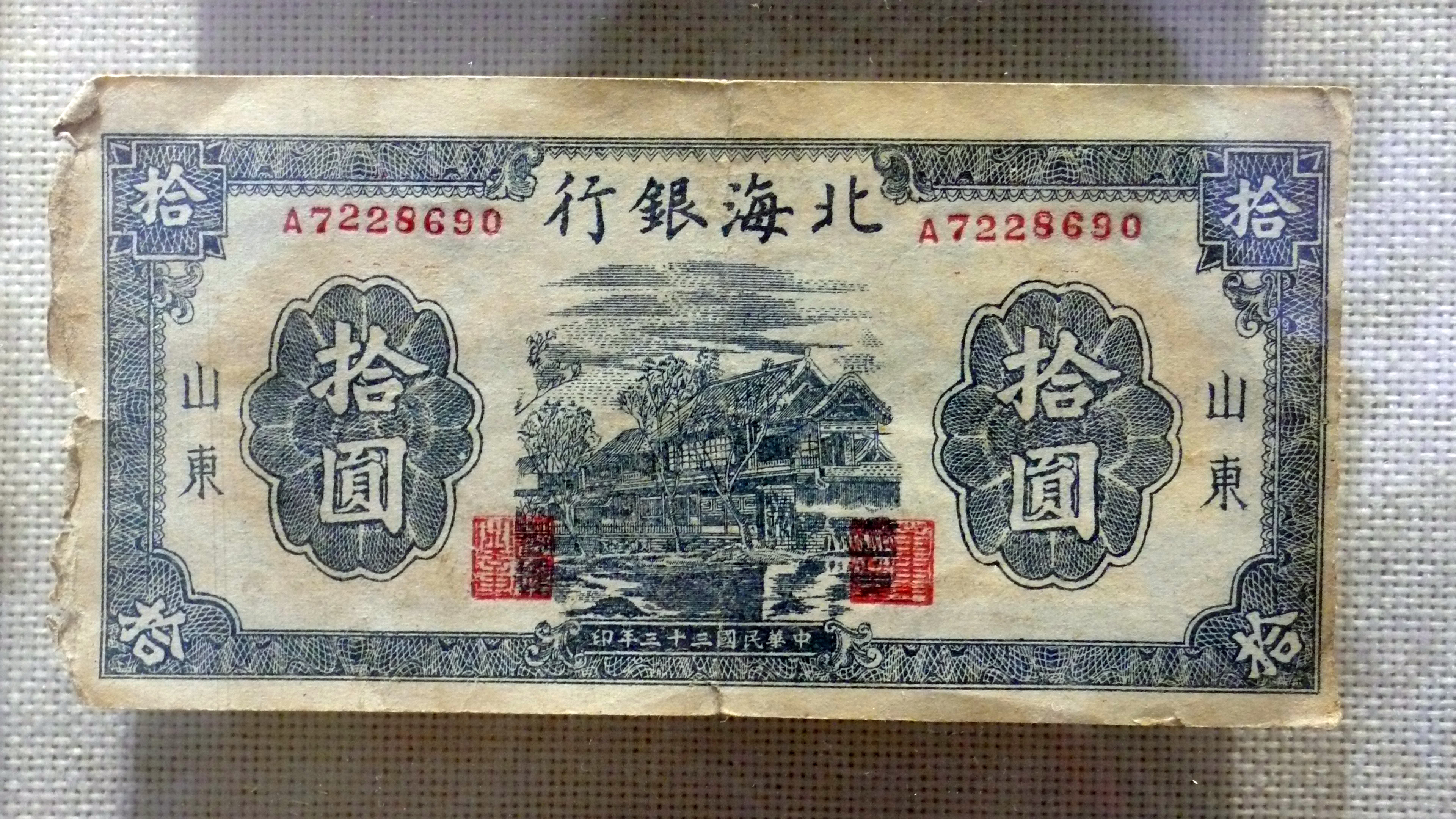 北海银行10元纸币。中华民国三十三年印。青州博物馆藏。